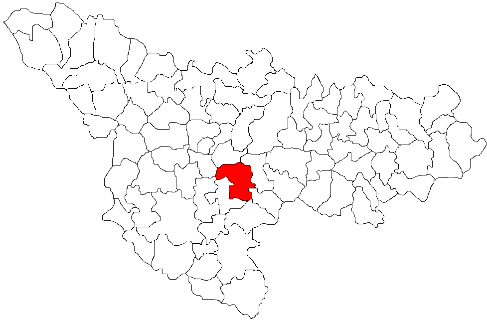 Categorie:Hărţi ale judeţului Timiş